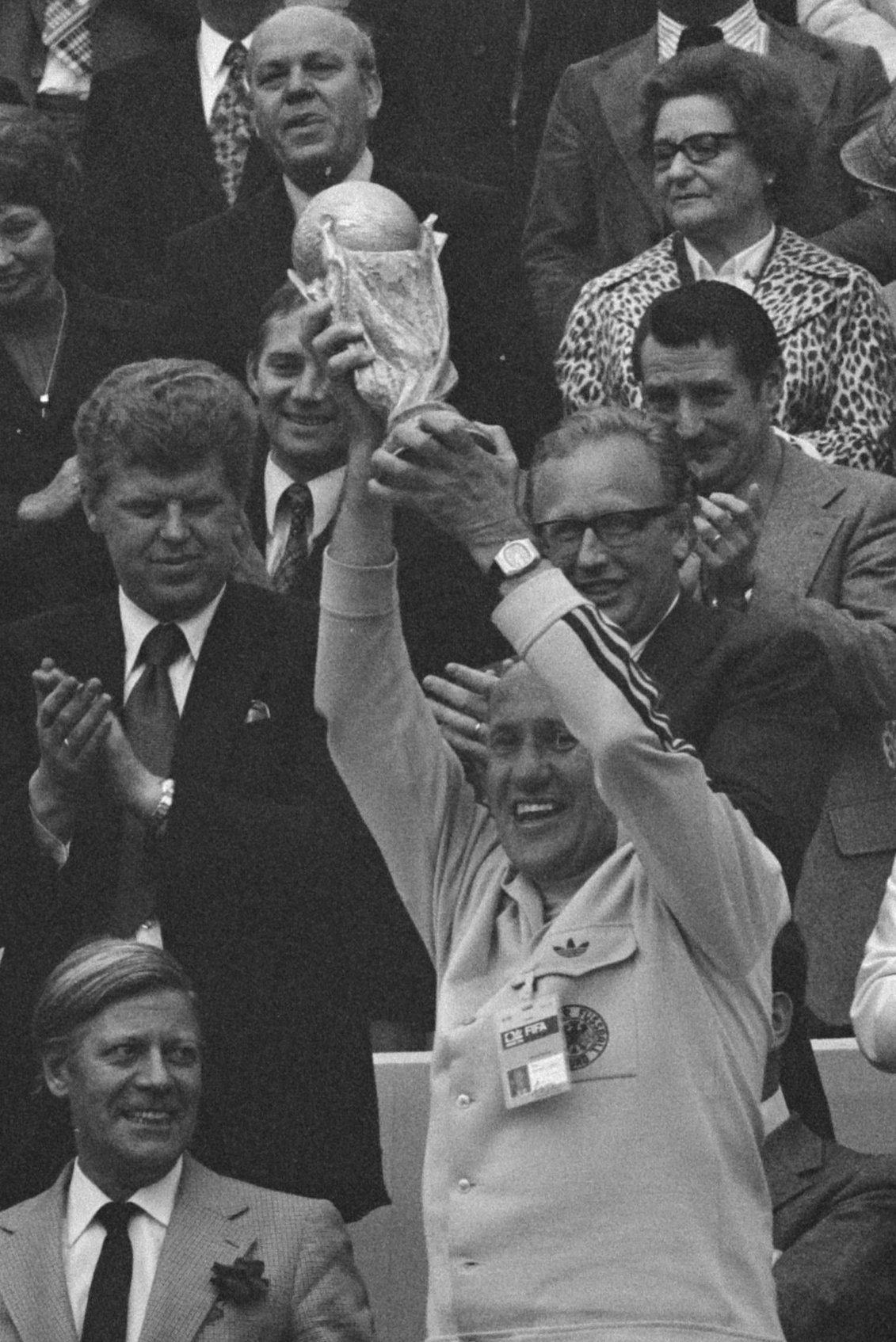 Collectie / Archief : Fotocollectie Anefo Reportage / Serie : [ onbekend ] Beschrijving : Finale wereldkampioenschap voetbal 1974 in Munchen, West Duitsland tegen Nederland 2-1; Duitse spelers met de wereldbeker Datum : 7 juli 1974 Locatie : München, Nederland, West-Duitsland Trefwoorden : finales, sport, voetbal, wereldkampioenschappen Fotograaf : Verhoeff, Bert / Anefo Auteursrechthebbende : Nationaal Archief Materiaalsoort : Negatief (zwart/wit) Nummer archiefinventaris : bekijk toegang 2.24.01.05 Bestanddeelnummer : 927-3100